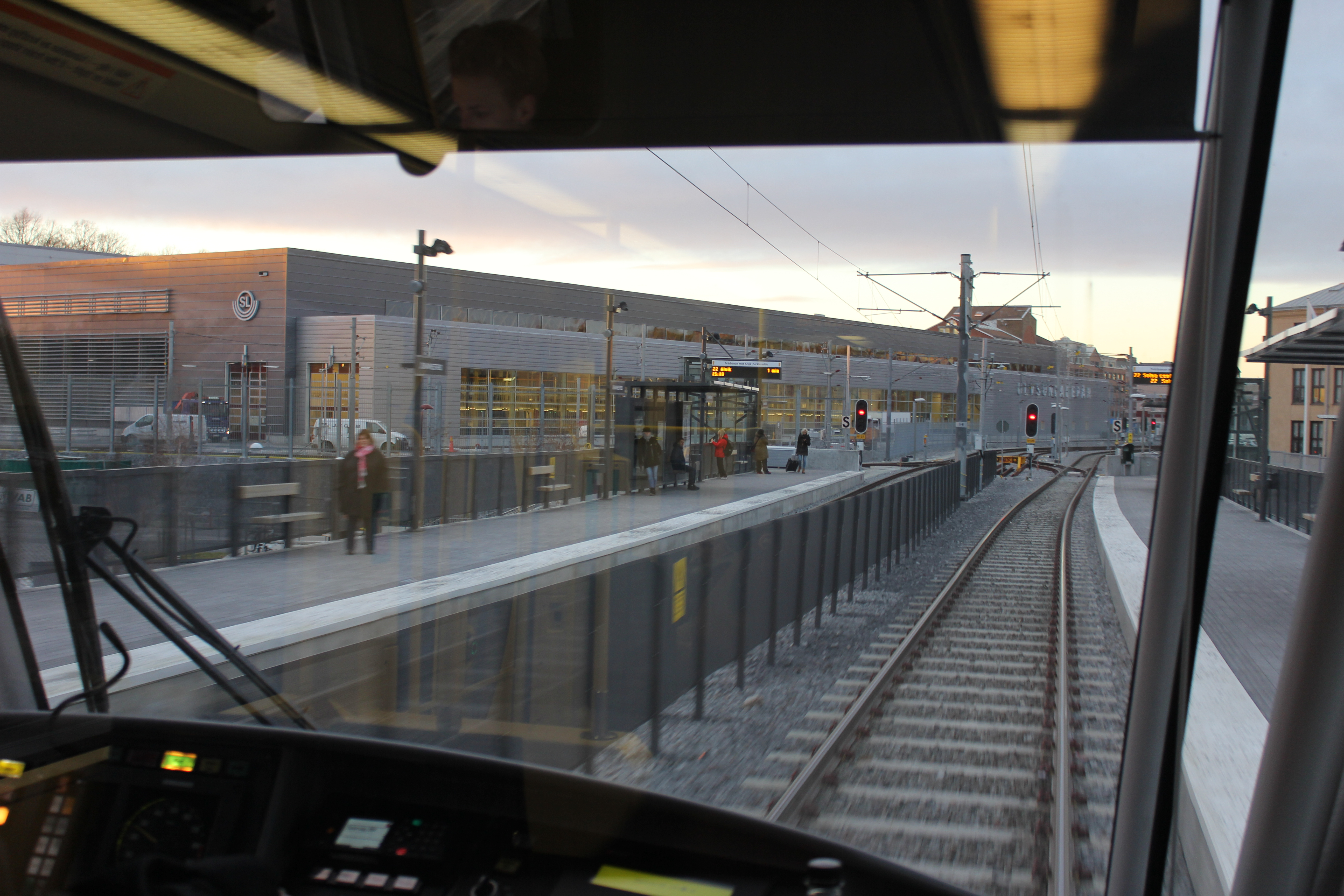 Johannesfreds spåvagnshållplats med Ulvsundadepån i bakgrunden.